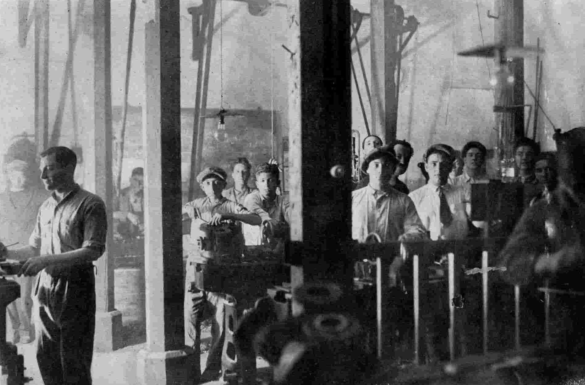 Cours de mécanique au Centre de Formation de la Bourse du Travail à Marseille, 1933